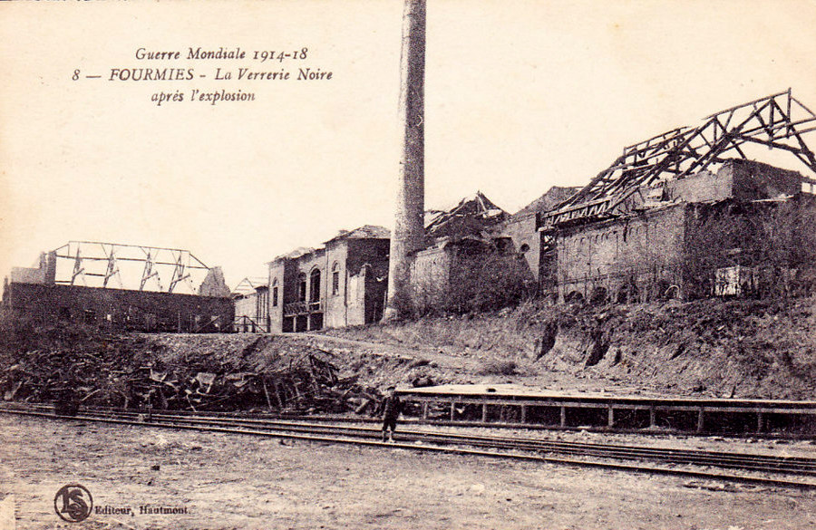 Fourmies - verrerie noire aprés explosion 14 18